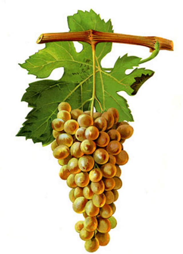 Grappe de Verdesse par Viala et Vermorel